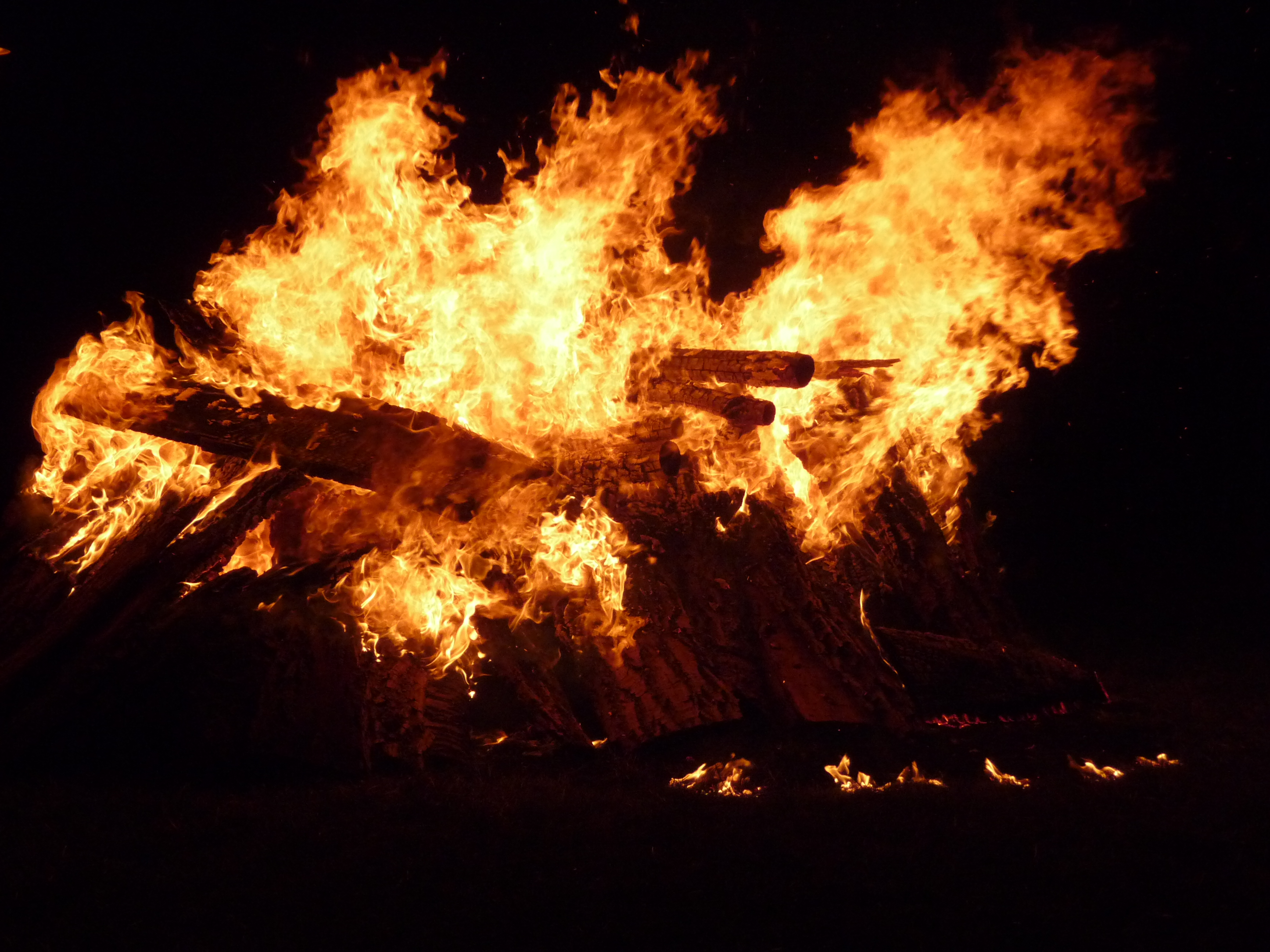 Lärmfeuer in Lorsch (Hessen, Baden-Württemberg, Deutschland)